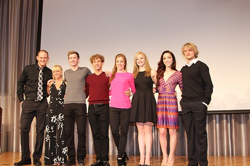 Команда США на командном чемпионате мира по фигурному катанию 2012. Слева на право:Джон Кафлин, Коди Денней, Джереми Эбботт, Адам Риппон, Эшли Вагнер, Грейси Голд, Мэрил Дэвис, Чарли Уайт